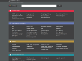 Fra legevakthåndbokens web-utgave